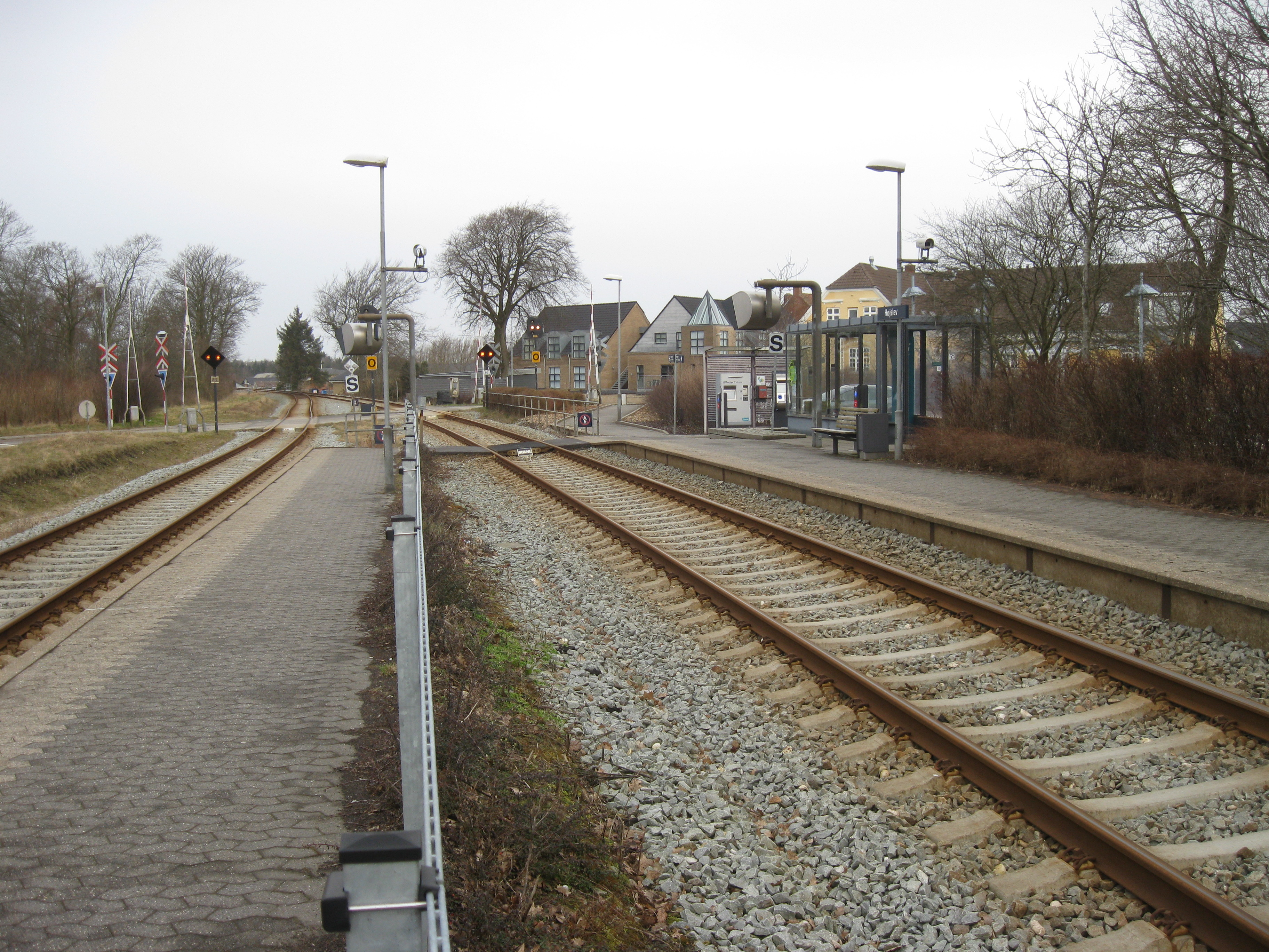 Højslev Station